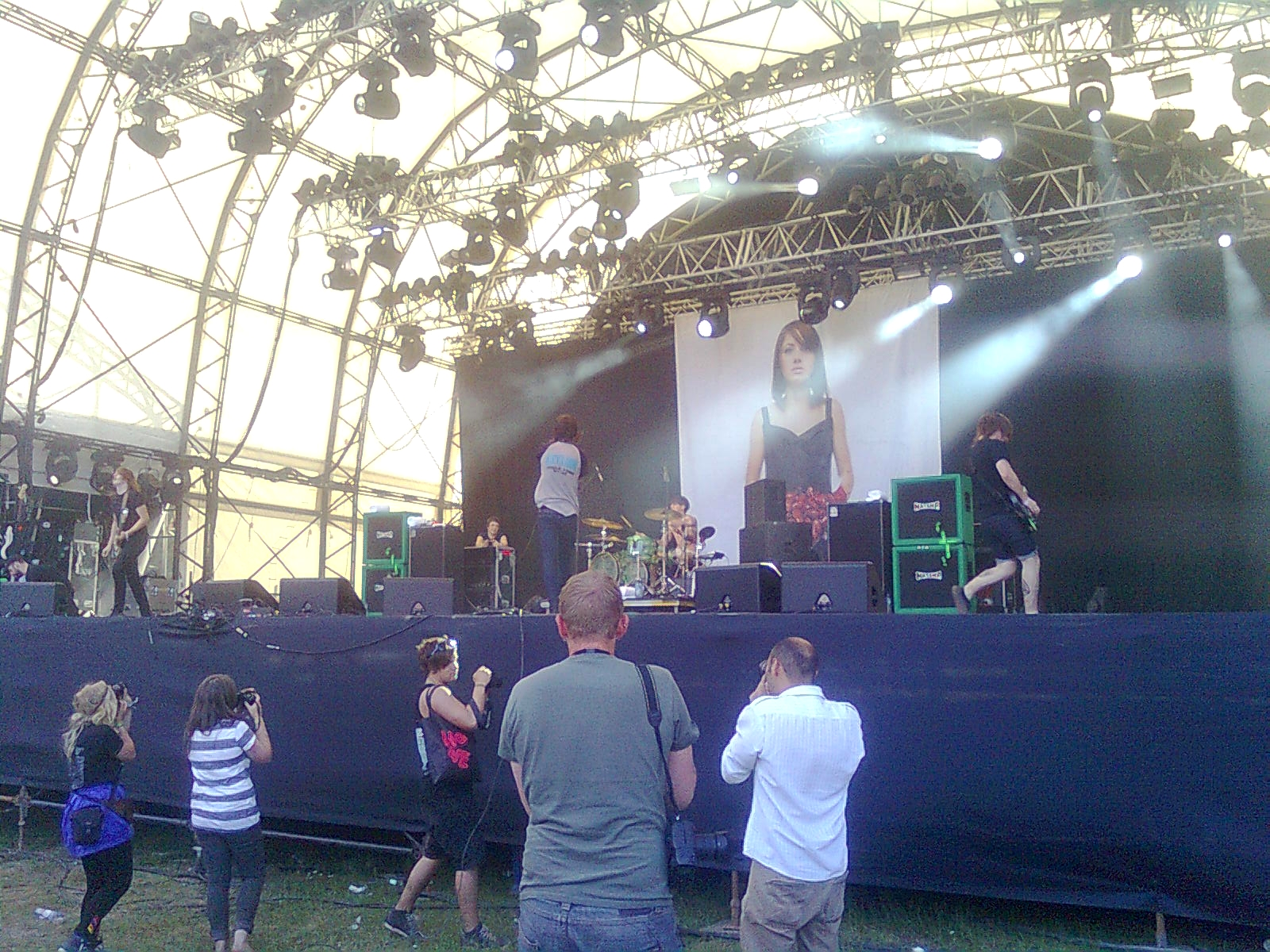 Bring Me The Horizon @ Hovefestivalen 2009